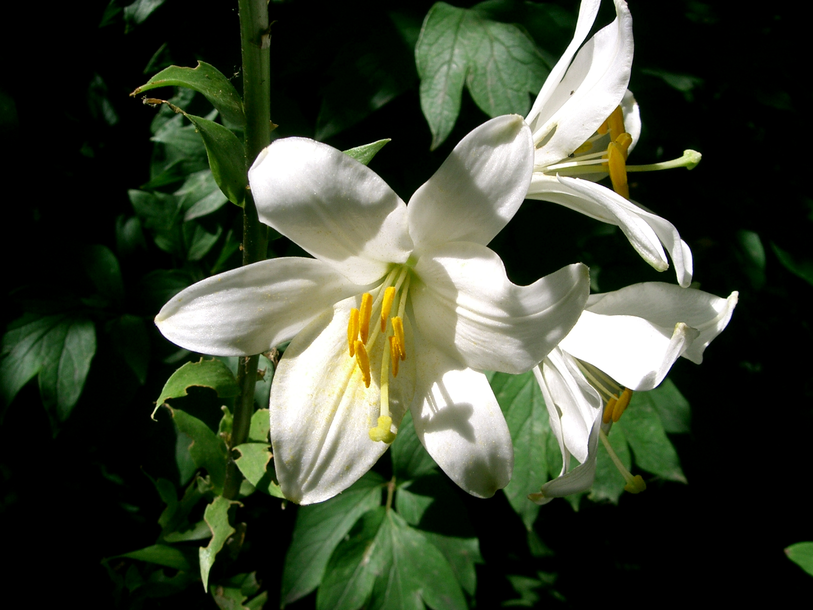 Fleurs de lys blanc self made PRA